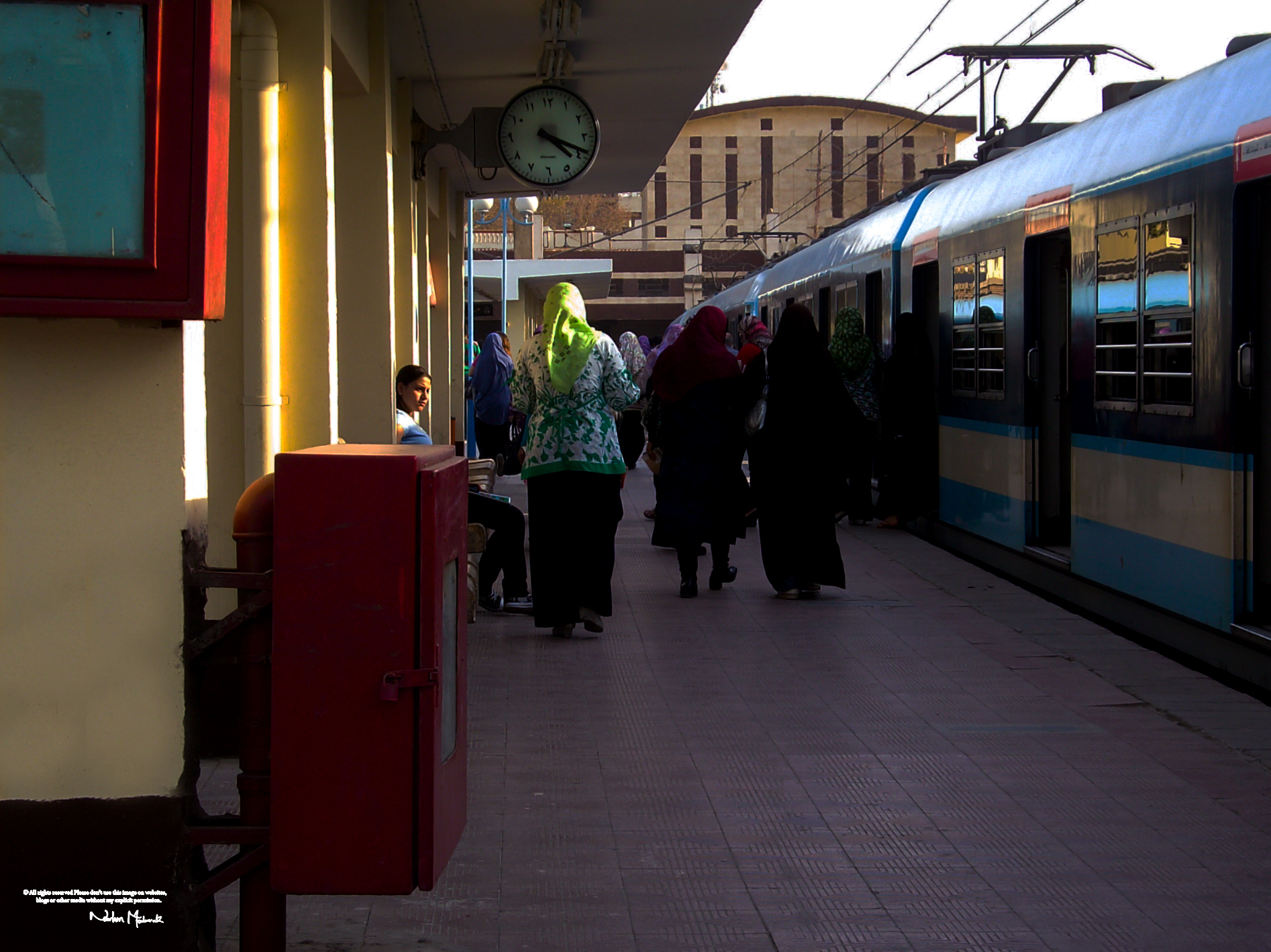 مترو أنفاق القاهرة يعد أول خط مترو يتم تسييره في مصر والوطن العربي وقارة أفريقيا، كما يعد أحد أهم وسائل المواصلات في القاهرة. أول خط كان خط (المرج - حلوان) والذي تحوّل لاحقاً إلى (المرج الجديدة - حلوان)، ثم تم تأسيس خط (شبرا الخيمة - الجيزة) وأصبح لاحقاً (شبرا الخيمة - أم المصريين)، ثم تم تدشين الخط الثالث بين مطار القاهرة حتى بولاق والأهرام، ويتم التخطيط لتدشين الخط الرابع This is an image with the theme "Africa on the Move or Transport" from: Egypt